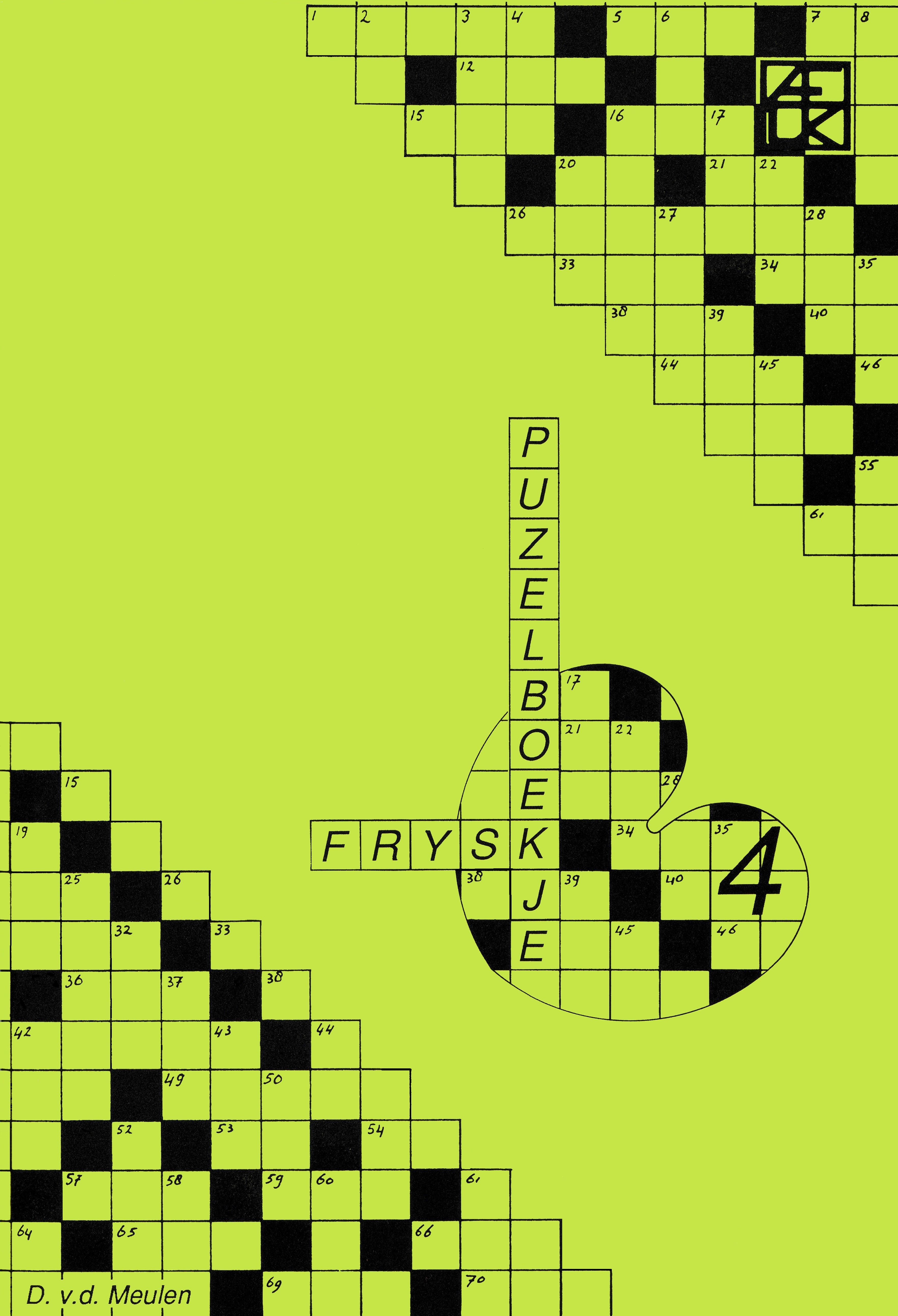 FryskPuzelboekje4 VDM, ynskende ôfbyld frijjûn troch de hear Eekma op 27 oktober 2008